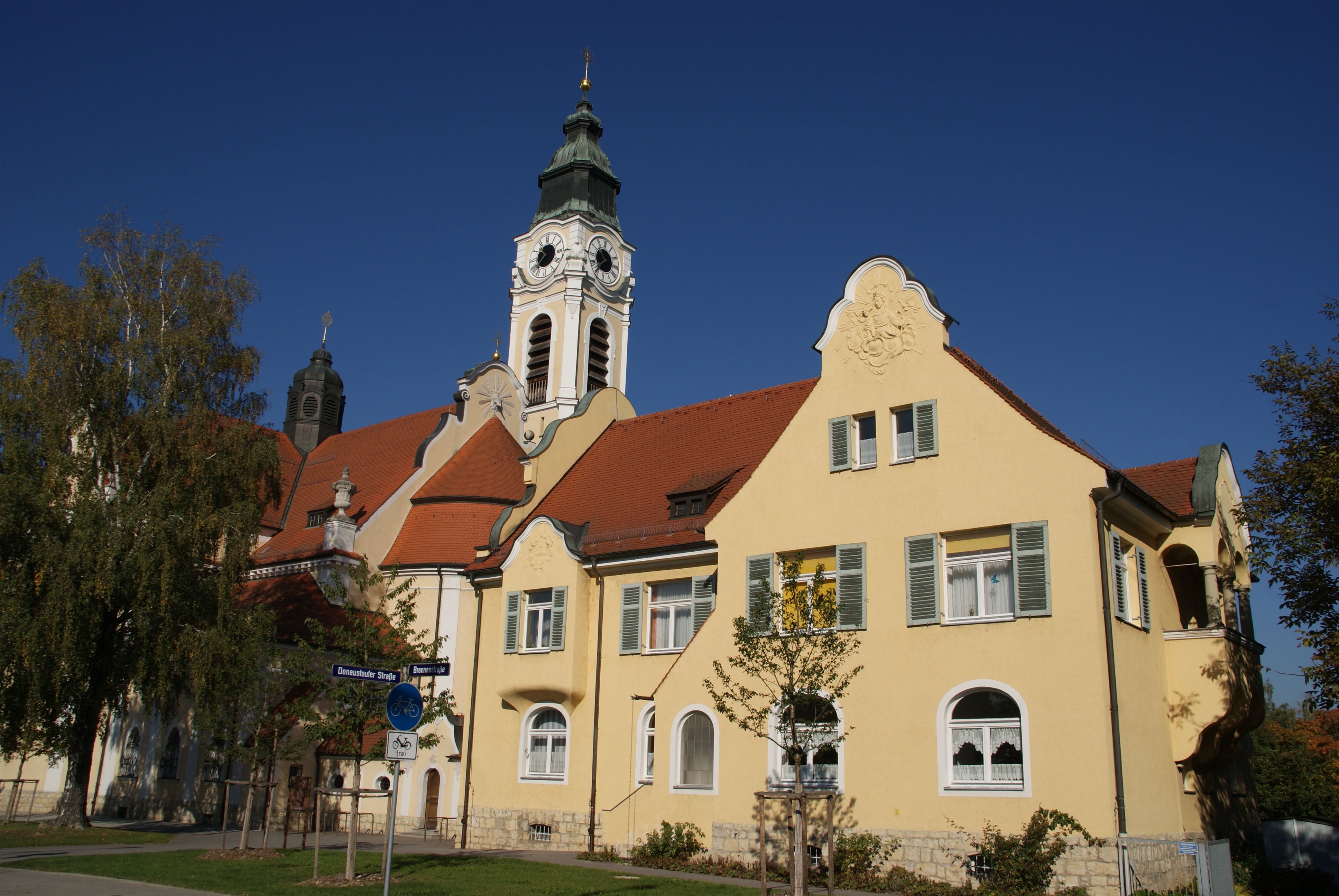 Katholische Stadtpfarrkirche St. Josef, Saalbau mit Querhaus und eingezogenem Chor, Chorflankenturm mit Haubendach, Schweifgiebelfassade und Vorzeichen mit Filialgiebel, neubarock, 1906-08 von Heinrich Hauberrisser; mit Ausstattung; Katholisches Pfarramt St. Josef, gegliederter zweigeschossiger Satteldachbau mit Seitenrisalit, Erker und Treppenaufgang, durch überdachten Gang mit der Sakristei der Stadtpfarrkirche verbunden, neubarock, um 1910 wohl von Heinrich Hauberrisser